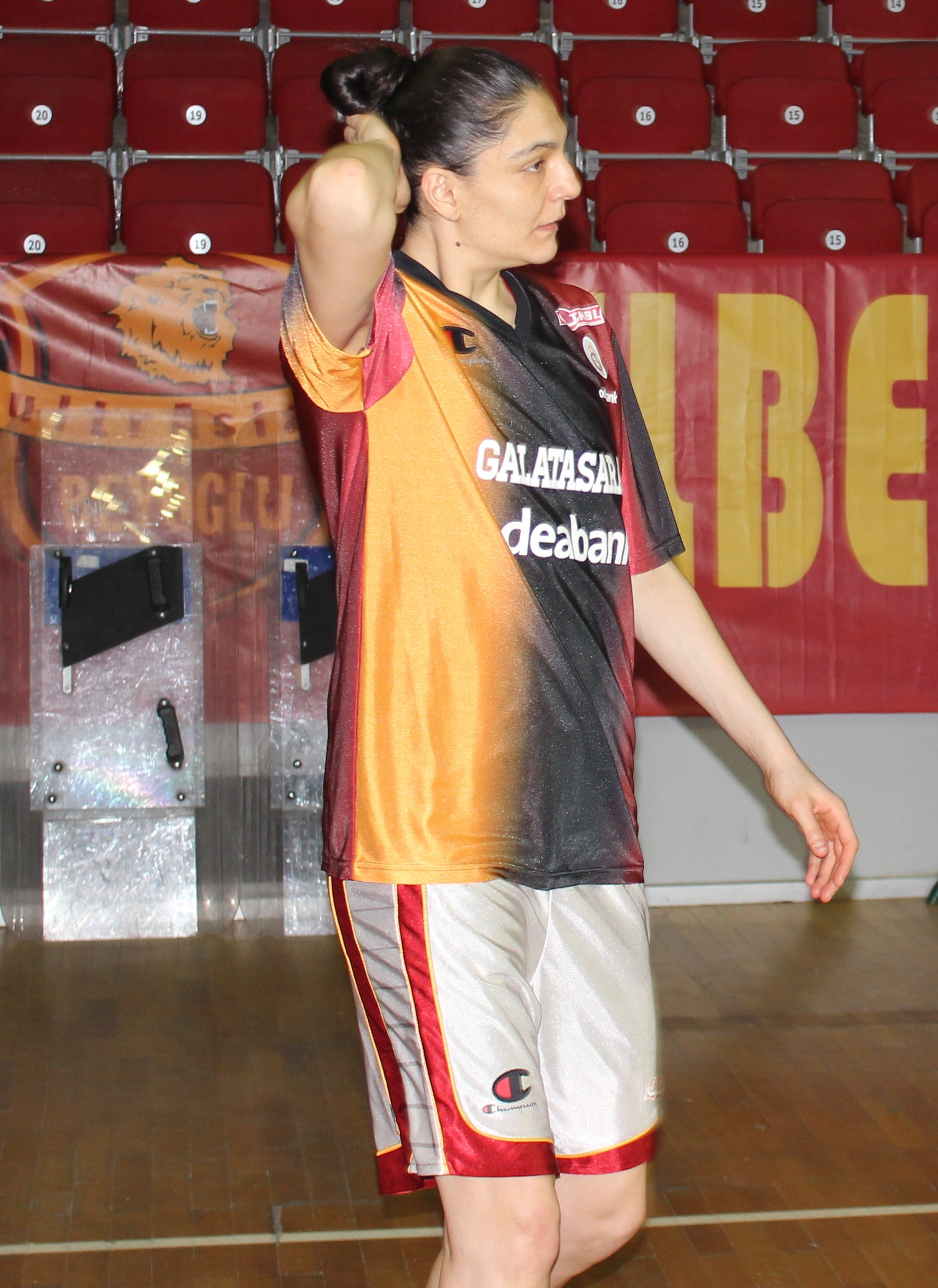 Nevriye Yılmaz